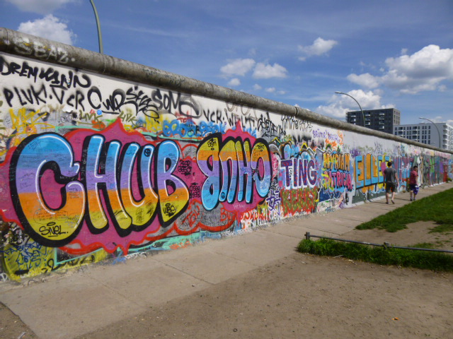 Die East Side Gallery in Berlin, entlang der Mühlenstraße; Reste der ehemaligen Mauer sind künstlerisch gestaltet. Hier von der Spree aus gesehen.